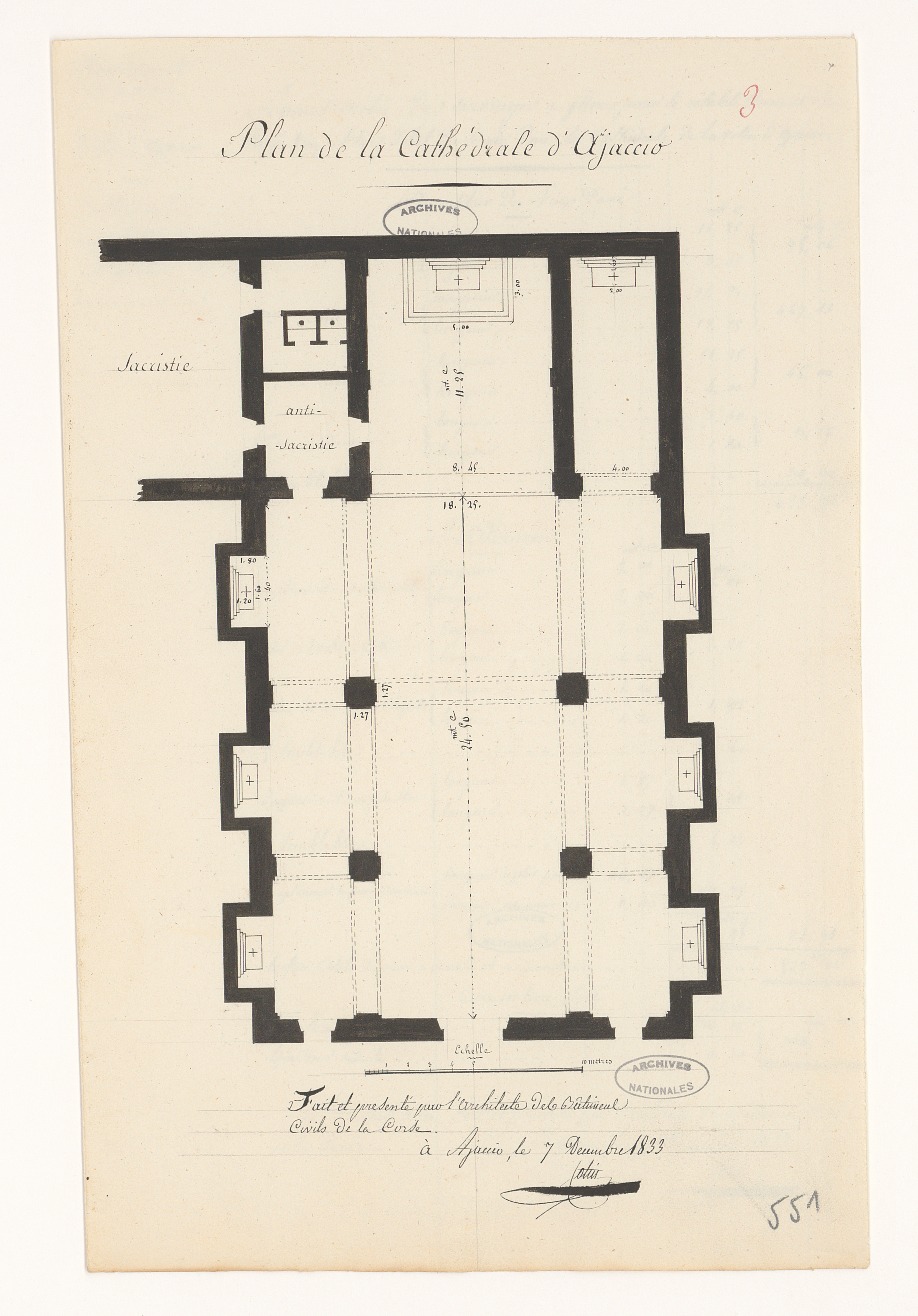 Plan de la cathédrale d'Ajaccio : joint à un devis estimatif pour le rétablissement du pavé vieux et hors d'état de service dans la cathédrale. Plan issu des dossiers de travaux de restauration des cathédrales (1802-1912), conservés aux Archives nationales (inventaire et autres documents numérisés consultables en ligne).